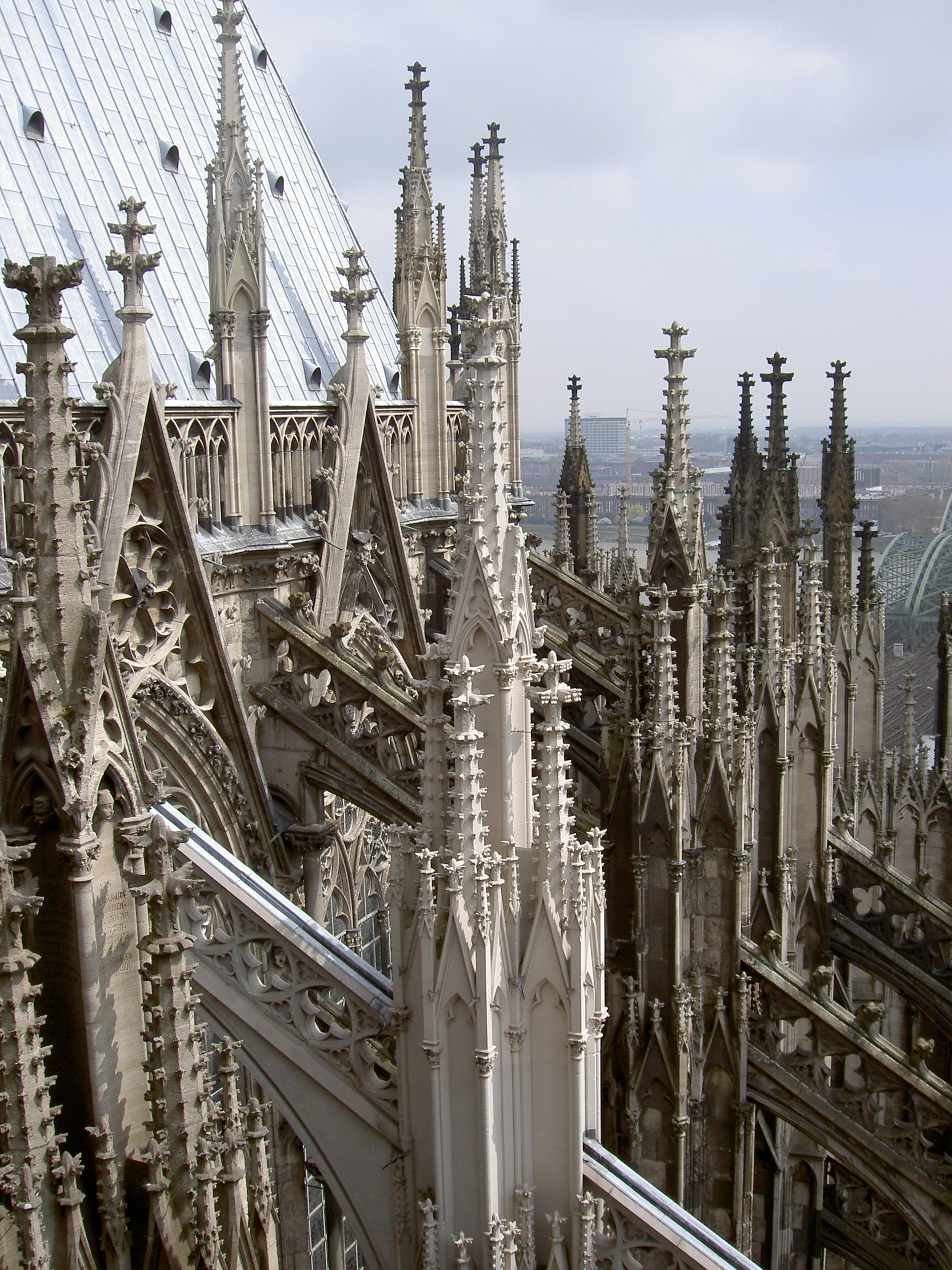 Kölner Dom (Cologne Cathedral). Blick nach Osten vom Dach des Mittelschiffs.